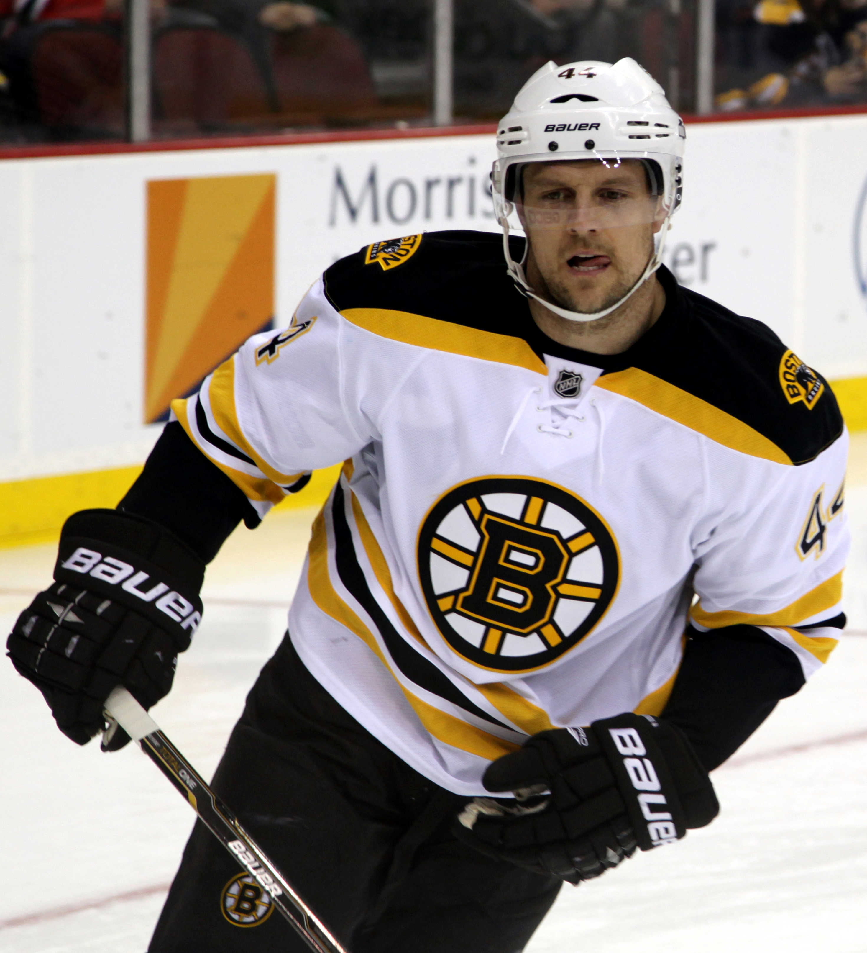 Seidenberg in 2012.